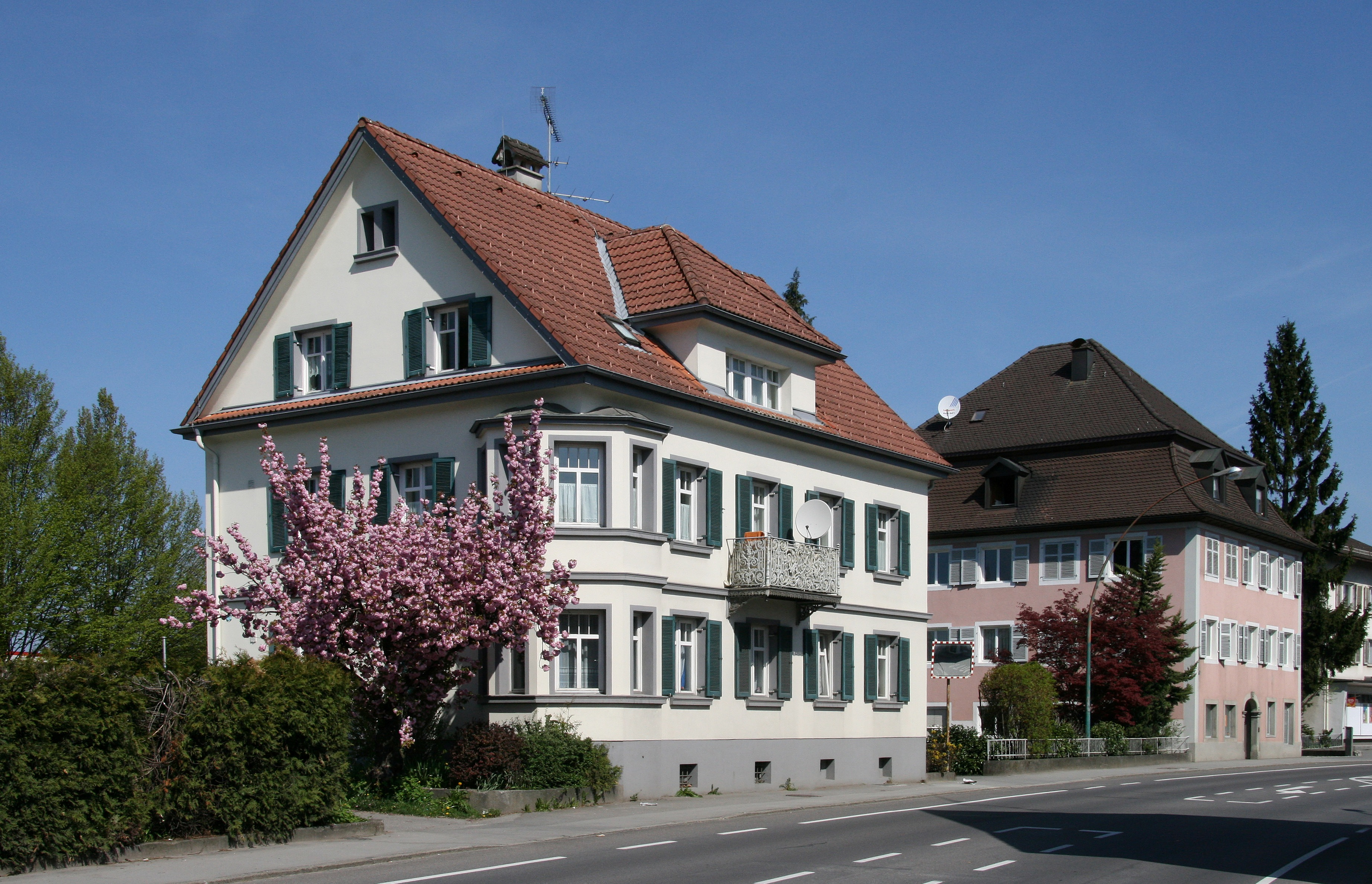 aus dem DEHIO Vorarlberg 1983: Bundesstraße Nr.64 vorne, hinten Nr.60: Gerichtsgebäude Hofsteig. 3geschossig, 5achsige Fassade mit Rundbogenportal mit altem Schlußstein, 5achsiger Seitenfront. Mansarddach. *** in Lauterach (Vorarlberg), Vorarlberg